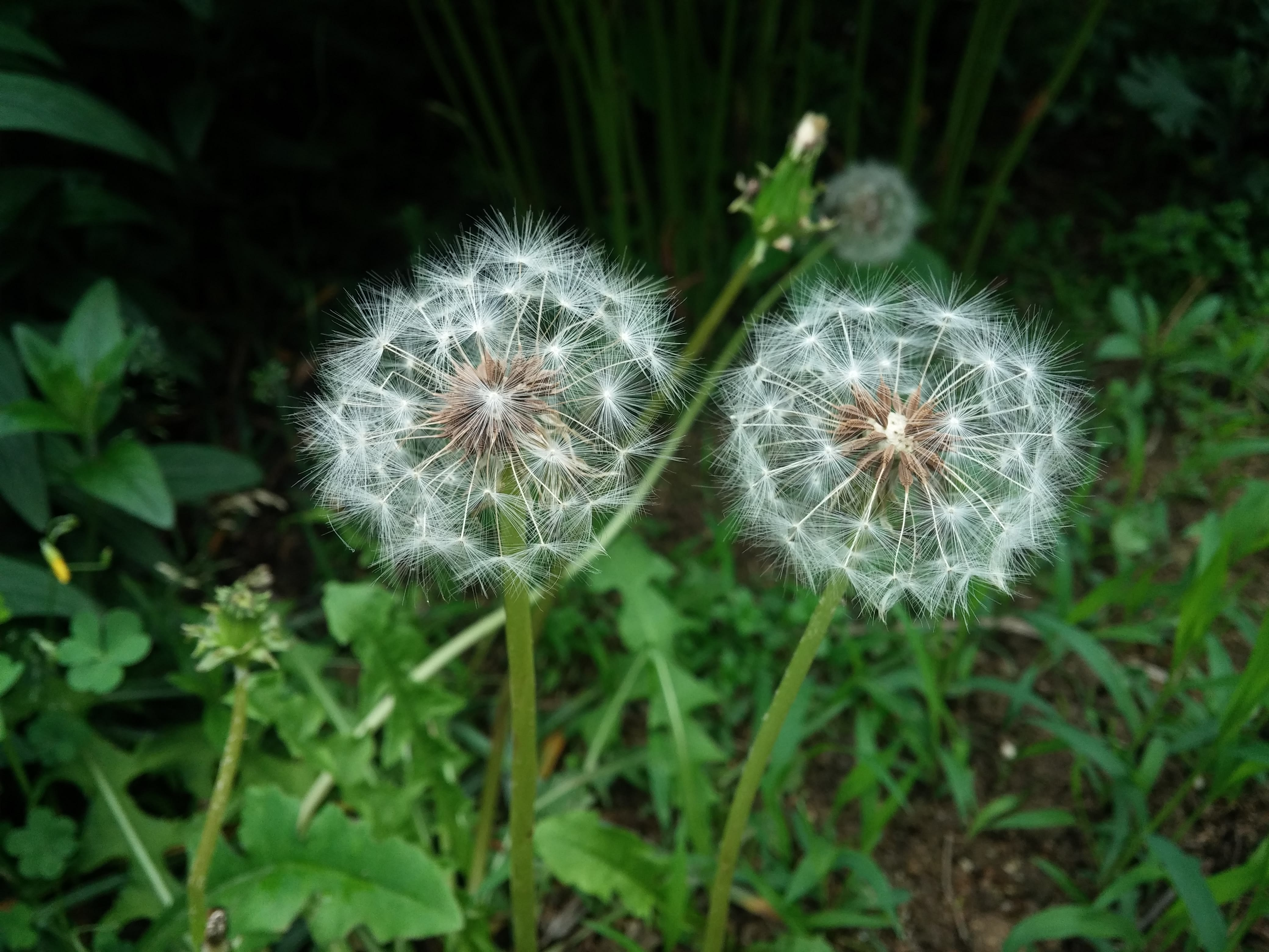 민들레